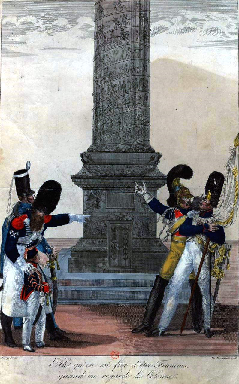 « Ah ! qu'on est fier d'être Français, quand on regarde la Colonne. » Des officiers français en uniforme et un enfant de troupe, admirent la colonne Vendôme à Paris durant le règne de Louis XVIII (un militaire à droite tient le drapeau blanc de la Restauration). Estampe de propagande bonapartiste par Caroline Naudet (1775-1839) publiée en 1819.